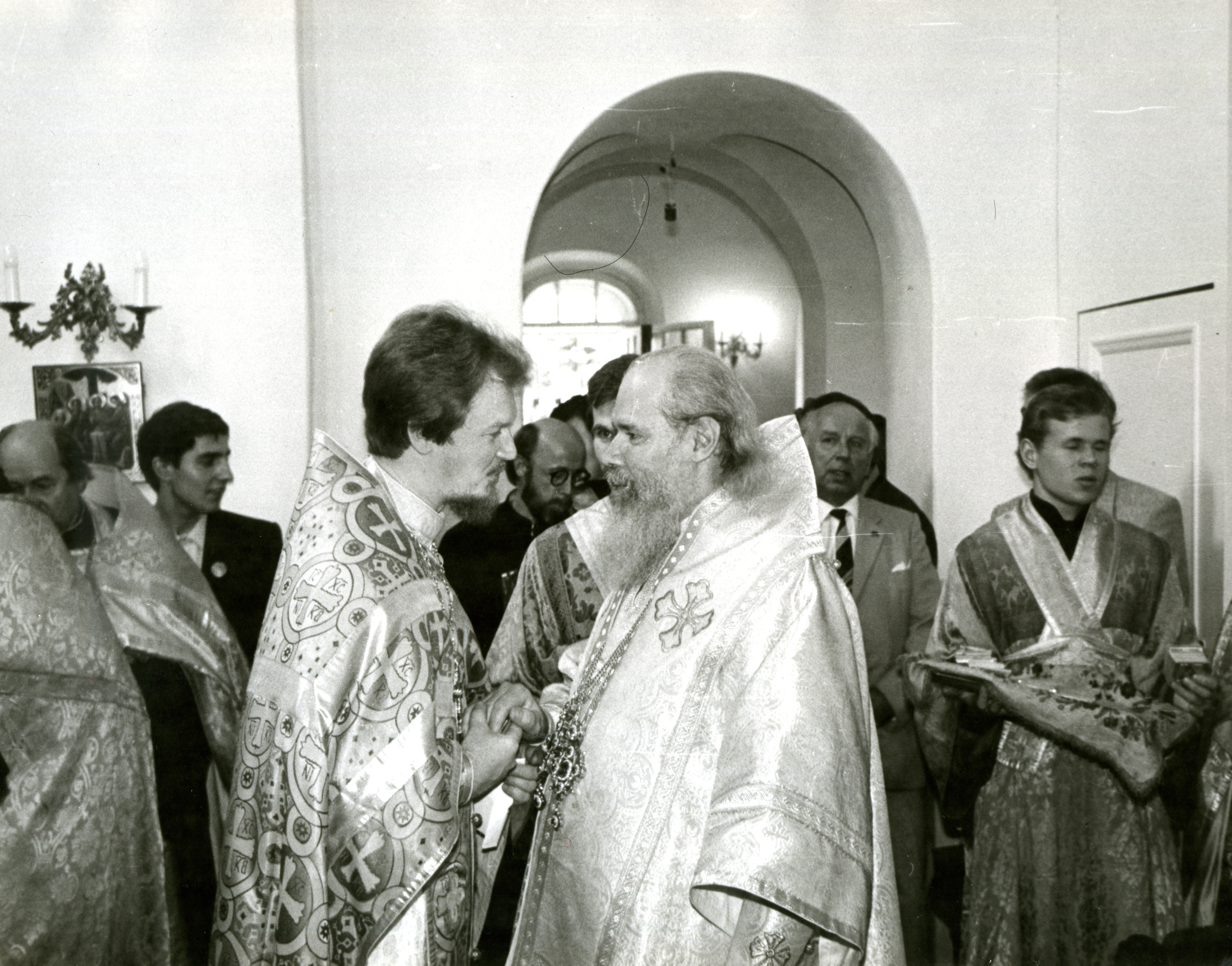 Патриарх Алексий ll и игумен Викентий на освящении Казанской церкви в Зеленогорске.